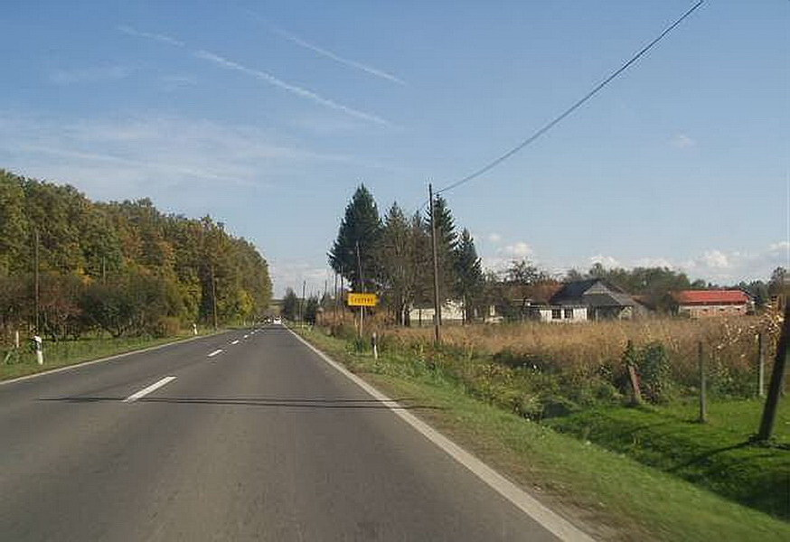 Cugovec - Entrance